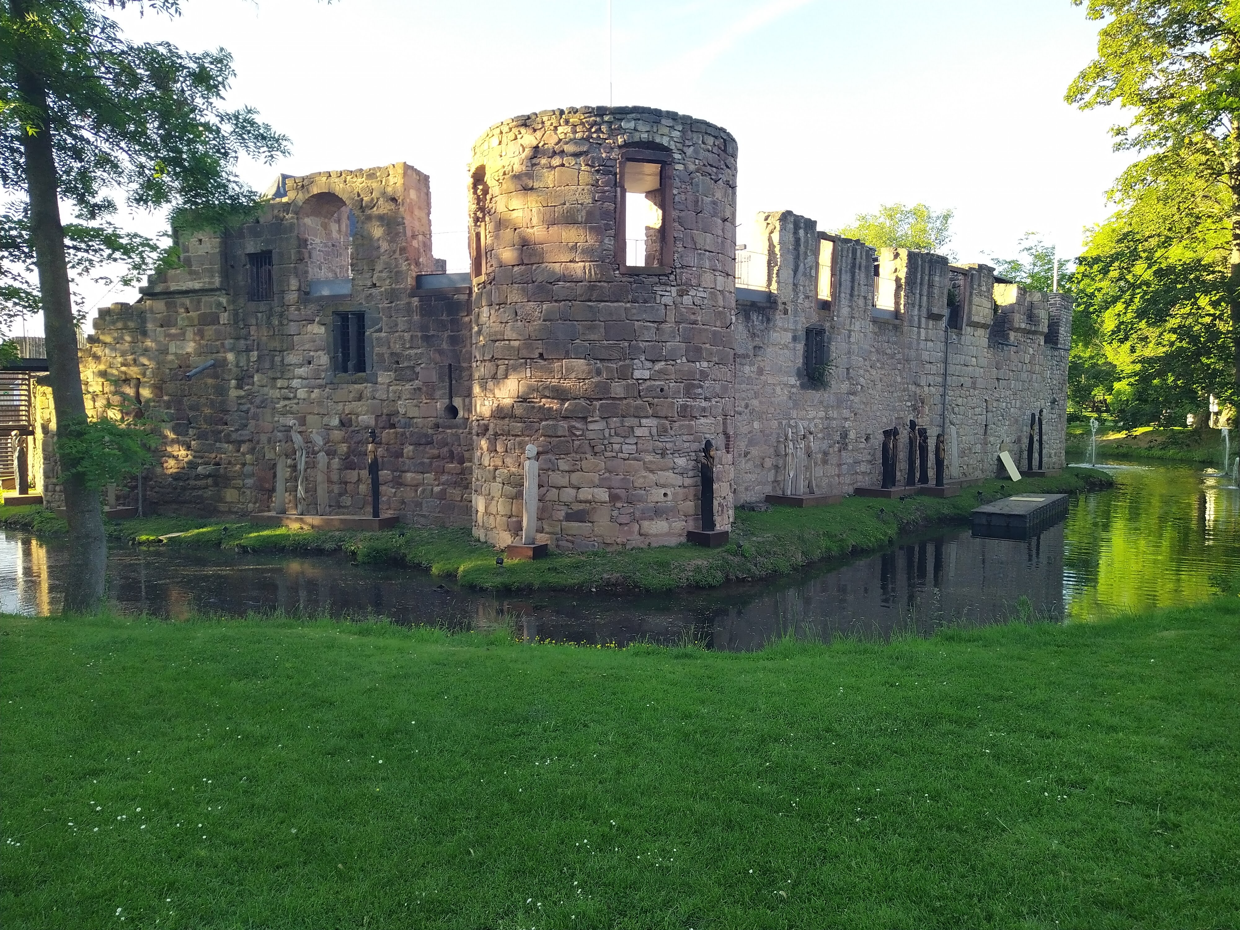 Wasserburg - Burg-Ruine, 12. bis 13. Jahrhundert erbaut, 1399 zerstört.